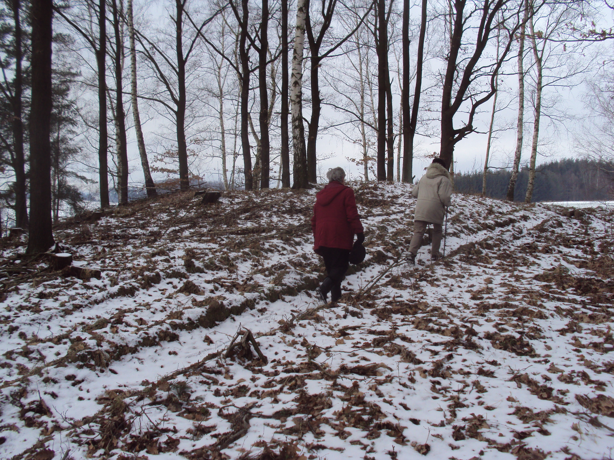 Kopeček 345 m. n. m. mezi Novými Zákupy a Lasvicemi, obojí patří pod Zákupy